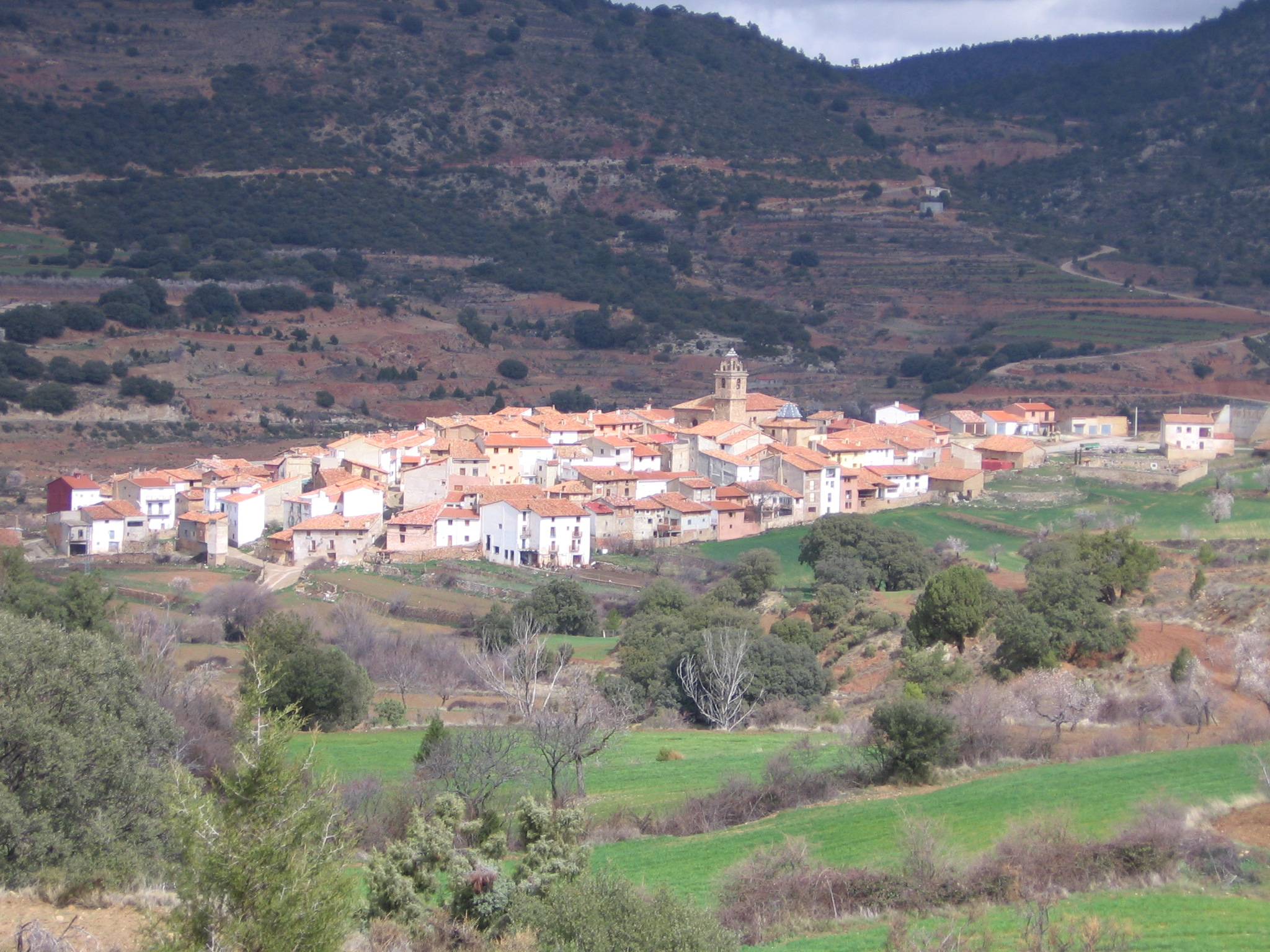 La Puebla de San Miguel es un municipio de la provincia de Valencia. Vista desde la carretera de acceso.